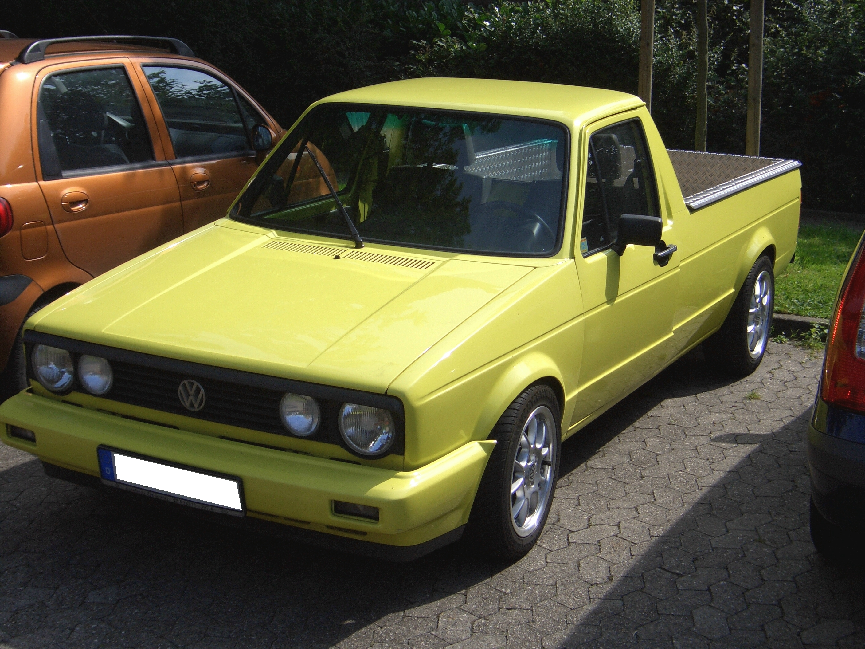 VW Caddy (14D, 1979-1983), seen in Düsseldorf, Germany